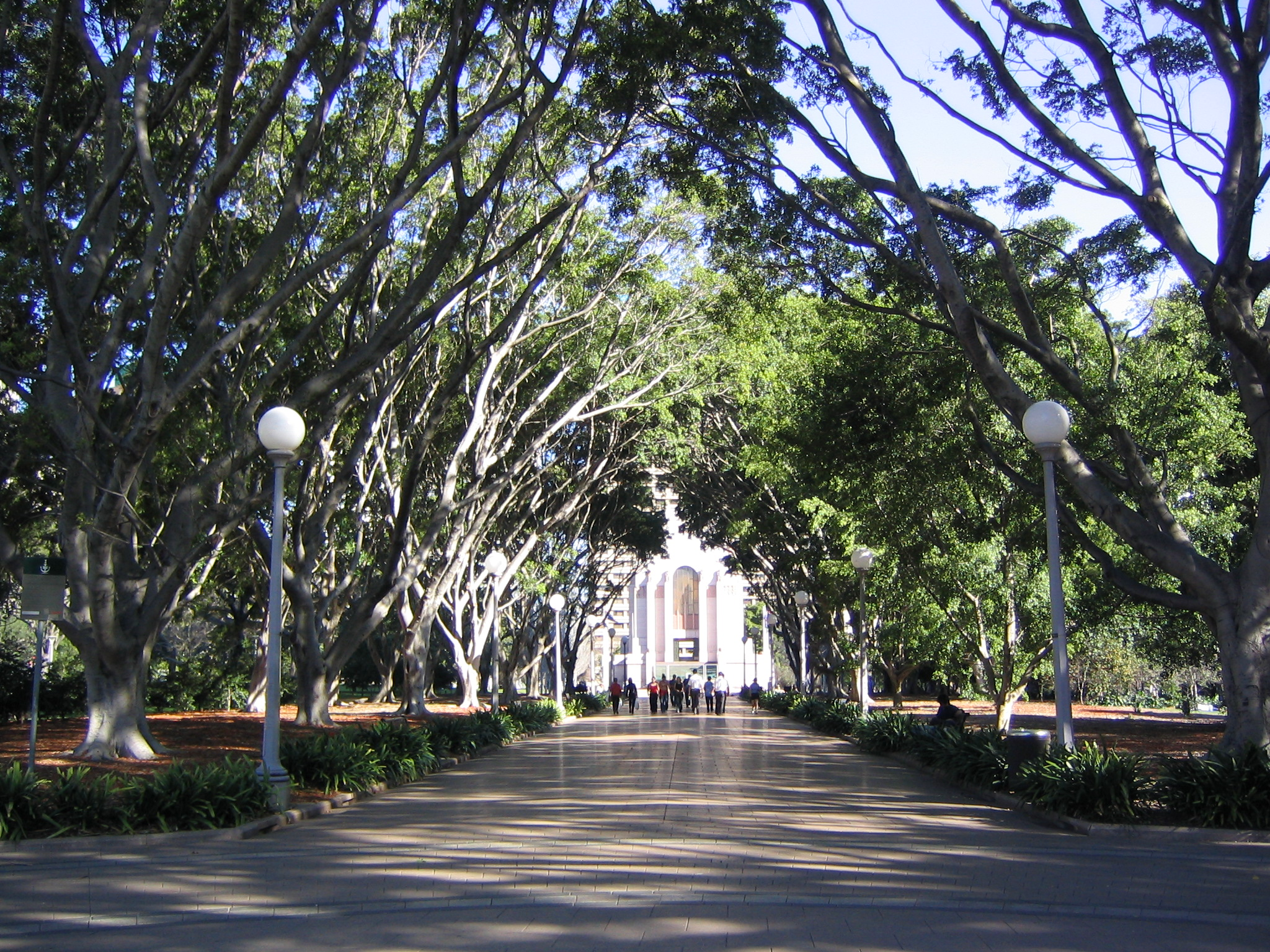 Hyde Park